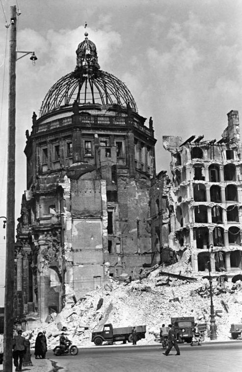 Berlin, Berliner Schloss, Ruine Zentralbild 19.9.1950 Berlin 1950 Abriss der Ruine des im II. Weltkrieg beschädigten Berliner Schlosses